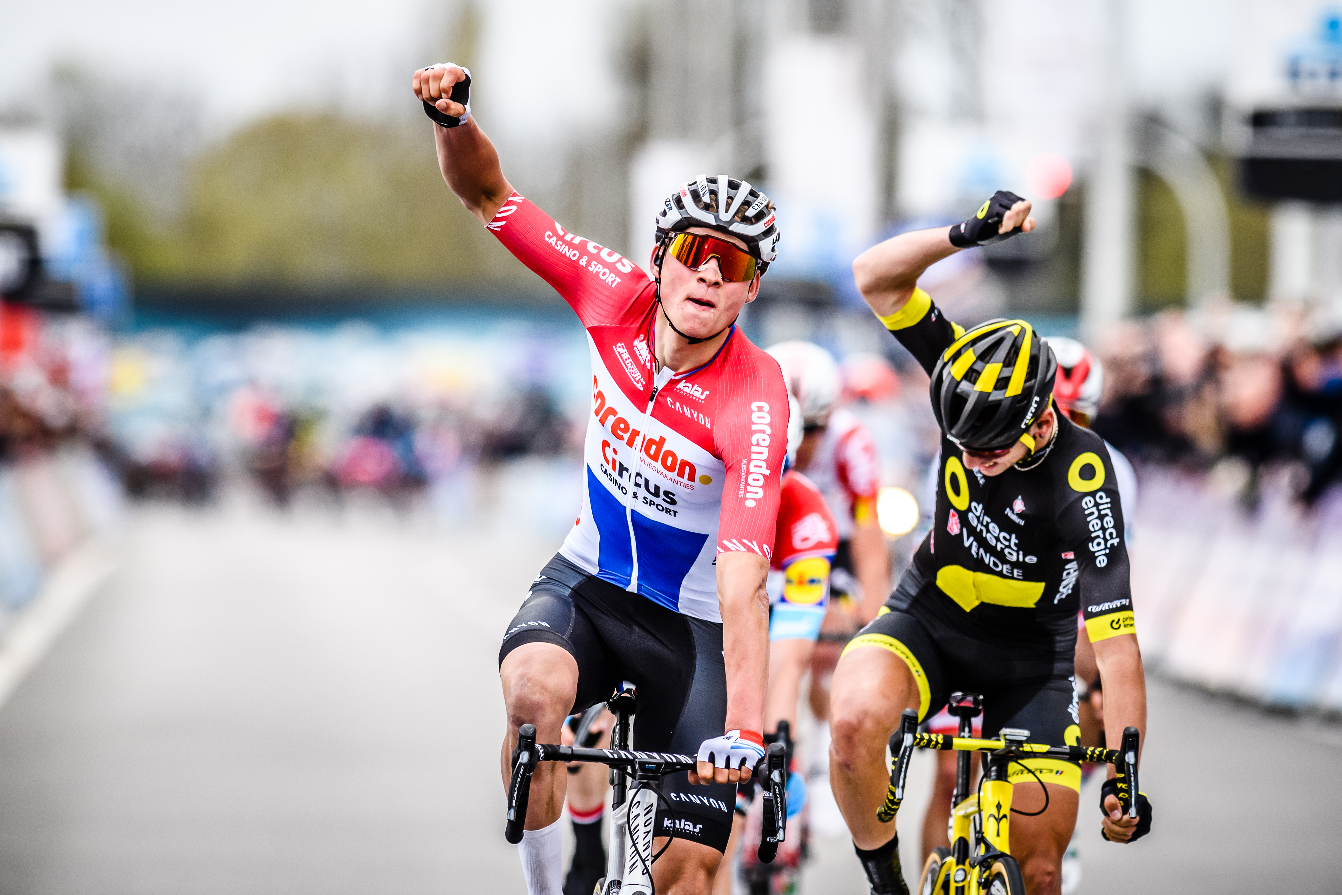 Mathieu van der Poel overschrijdt na 181 km triomfantelijk de finish. Hij geeft zij vier medevluchters Anthony Turgis, Bob Jungels, Lukas Pöstelberger en Tiesje Benoot het nakijken.